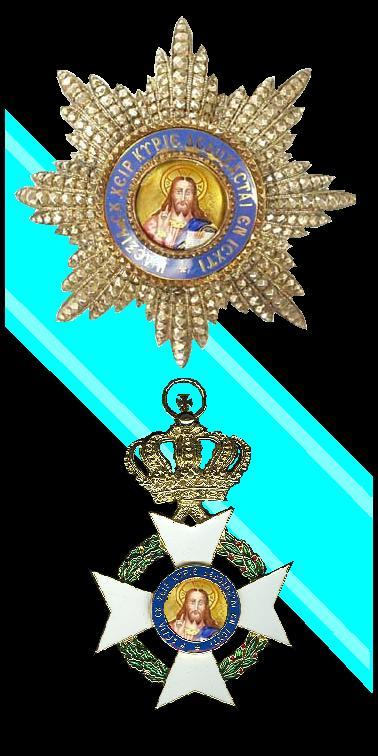 Ster en kruis uit mijn verzameling. Gescand en bewerkt. Het lint is getekend. Op dit ontwerp uit 1830 berust geen auteursrecht Robert Prummel 10 jun 2006 00:10 (CEST)